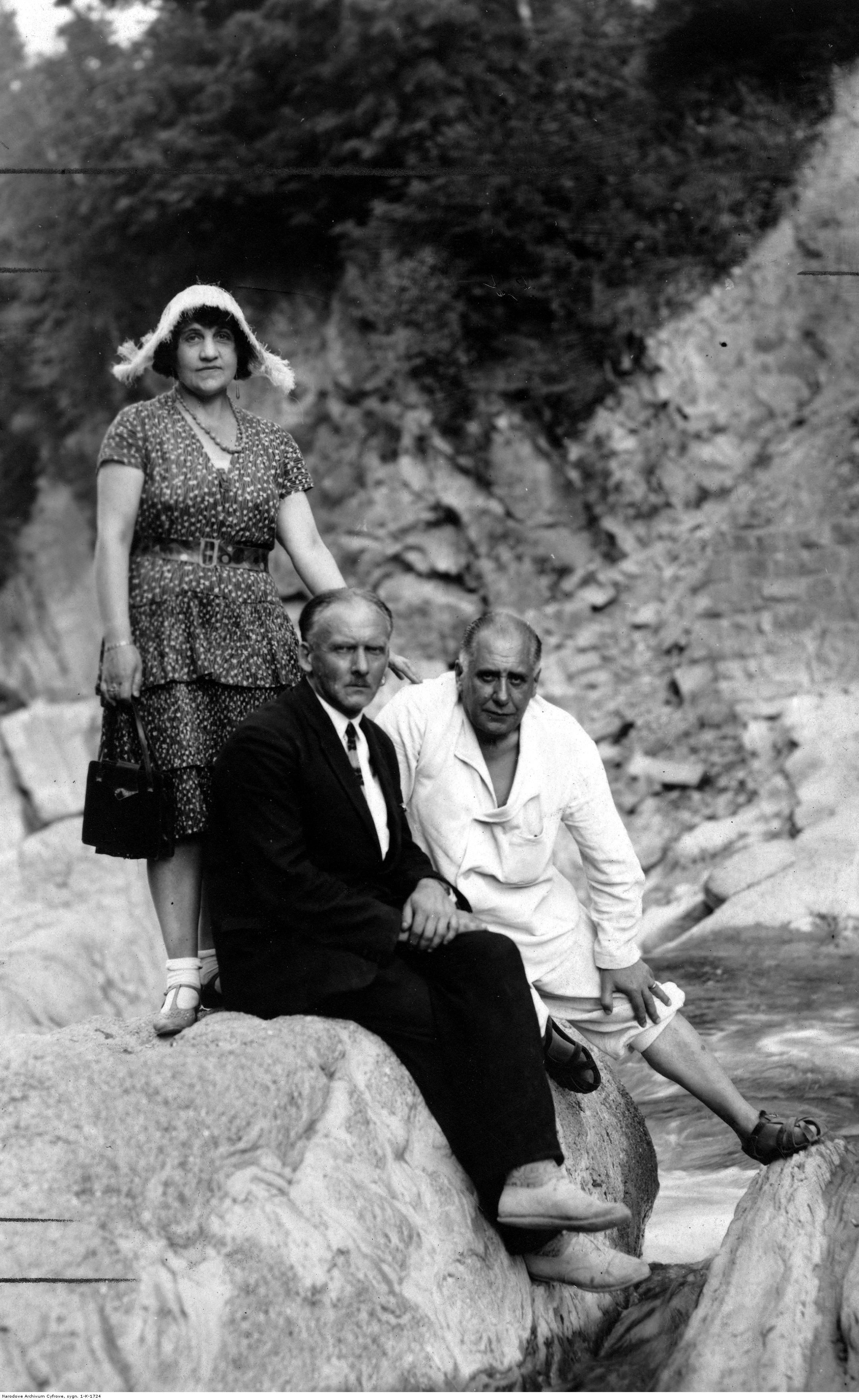 Ferdynand Ossendowski (siedzi z prawej) z żoną Zofią i dziennikarzem rosyjskim L. Liniewiczem na wczasach. Kosów Huculski k. Kołomyi. (Koncern Ilustrowany Kurier Codzienny - Archiwum Ilustracji)